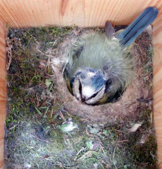 Blaumeise (Cyanistes caeruleus), Weibchen brütet